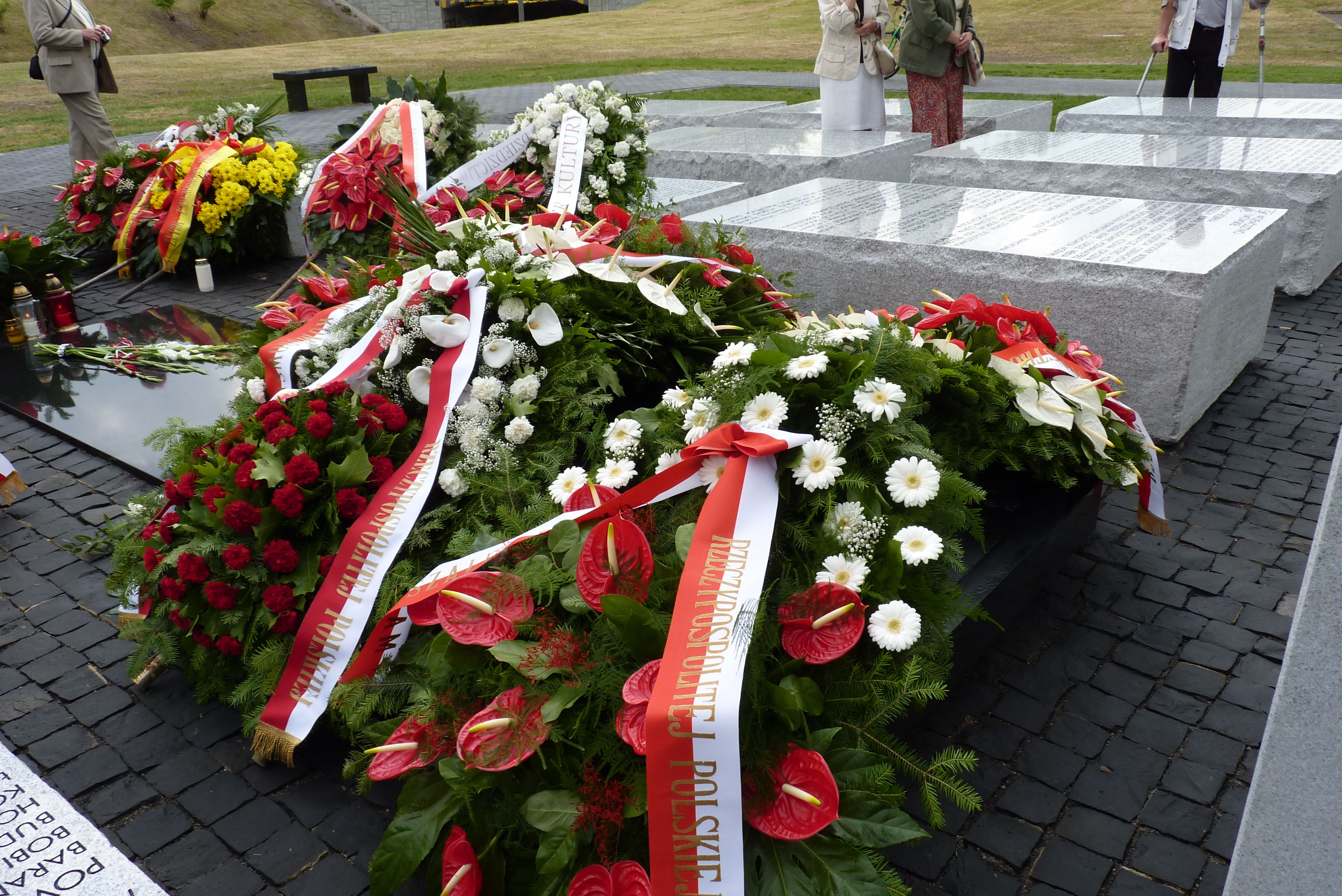 Pomnik w hołdzie ofiarom mordu wołyńskiego